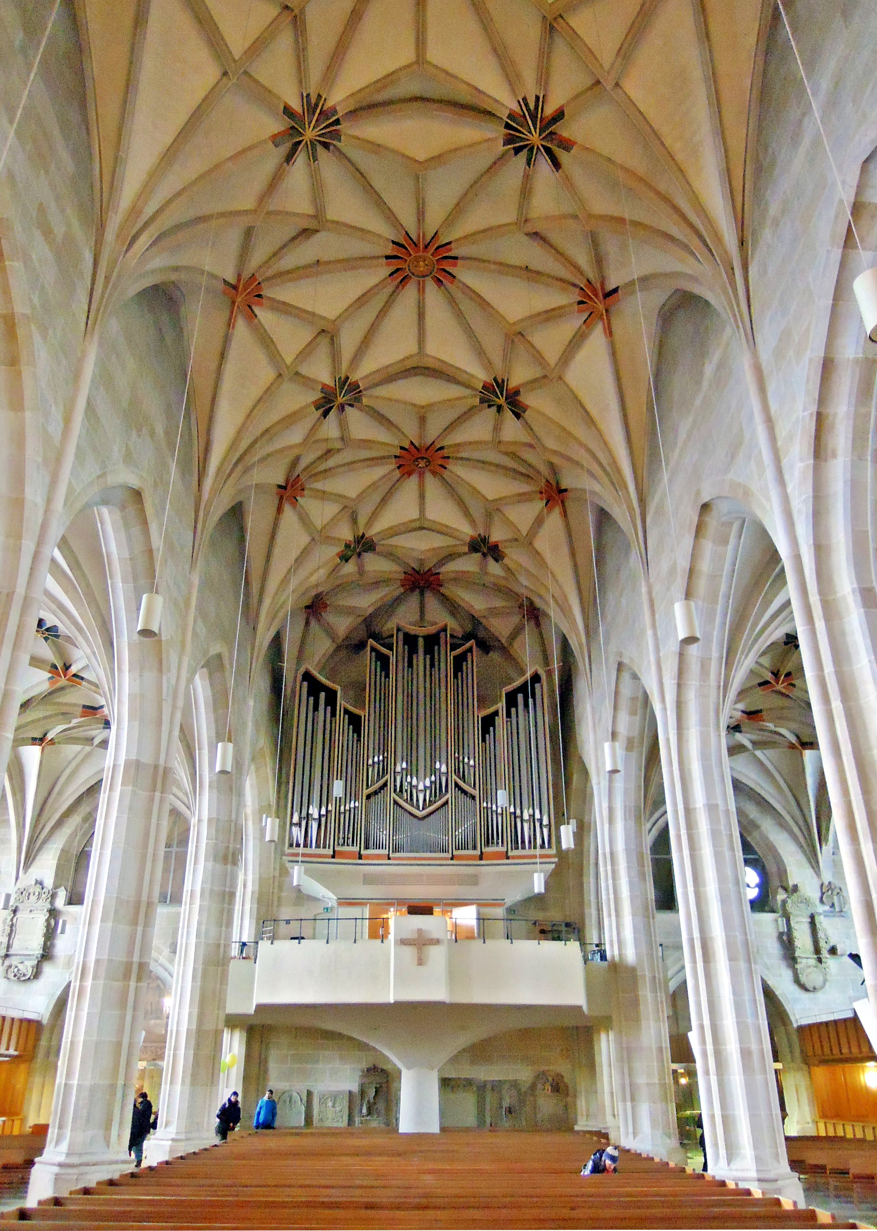 Orgel